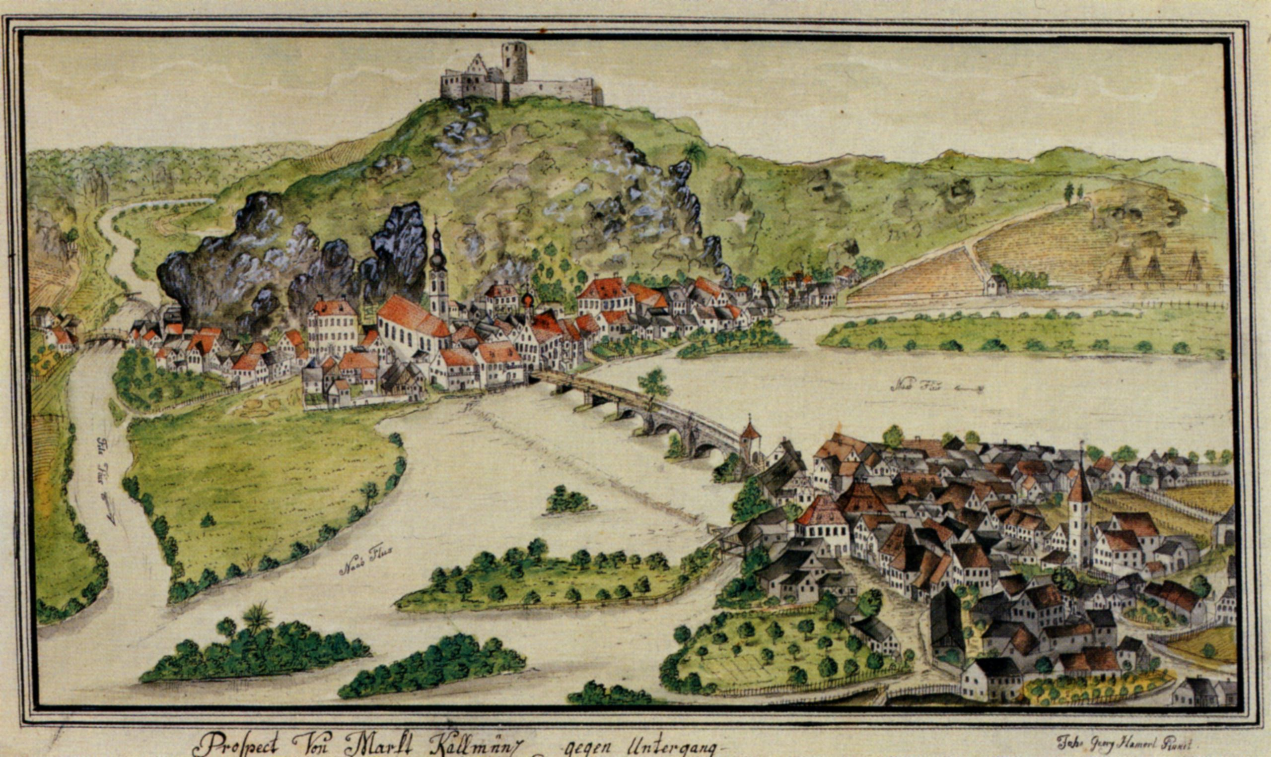 Ansicht der Oberpfälzer Marktgemeinde Kallmünz am Zusammenfluss von Naab und Vils von Johann Georg Hämmerl dem Jüngeren (1770-1838).